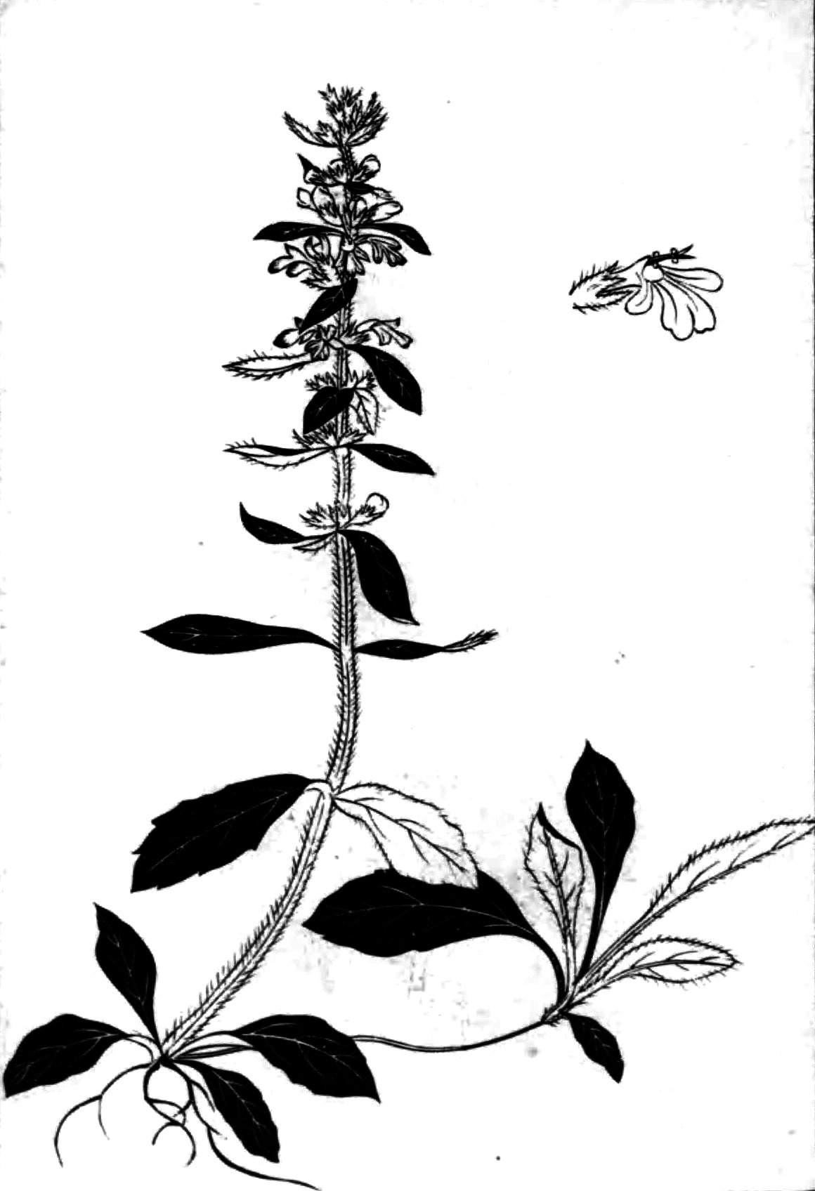 ジュウニヒトエ (学名:Ajuga nipponensis makino)